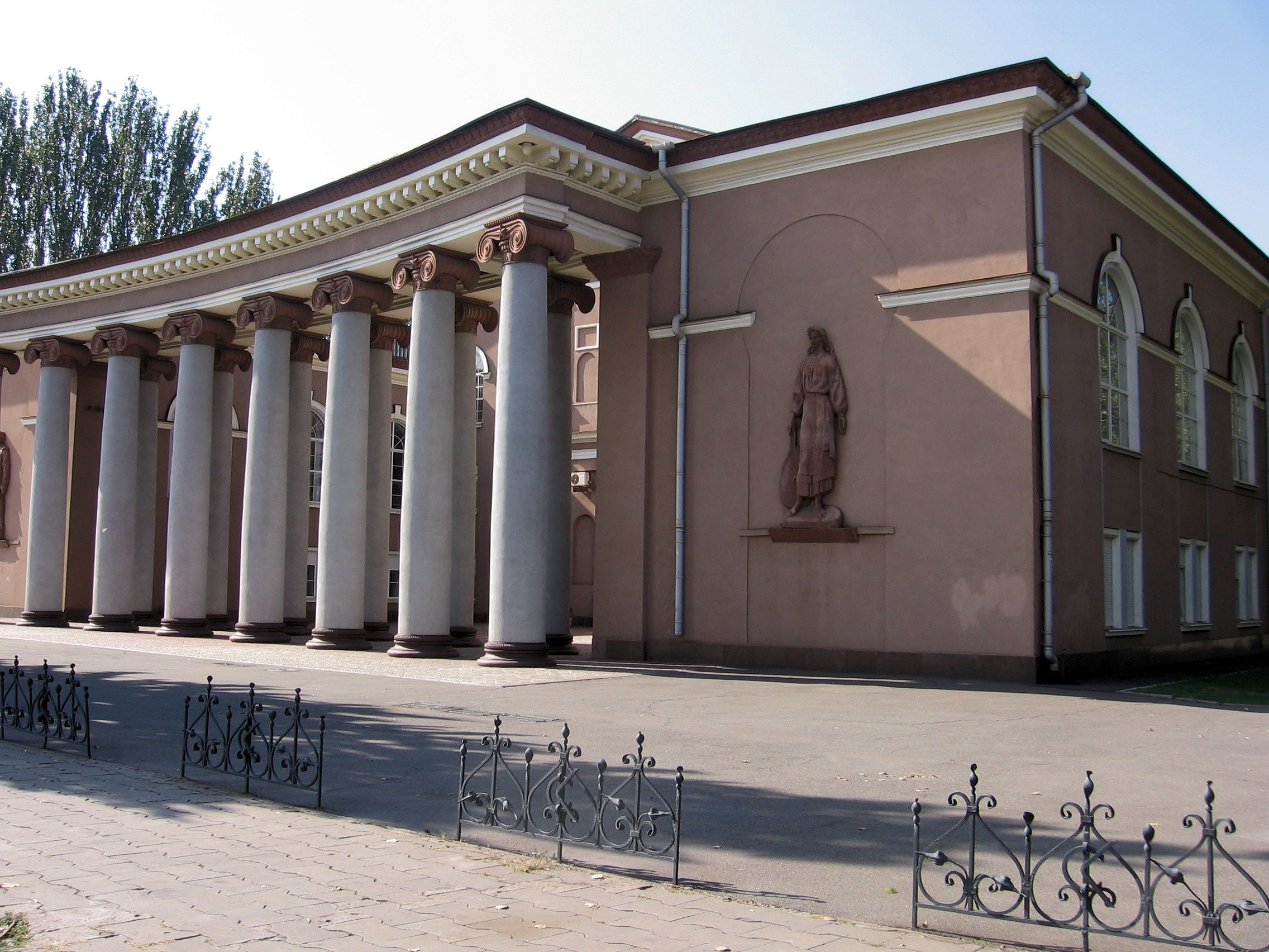 Палац культури металургів